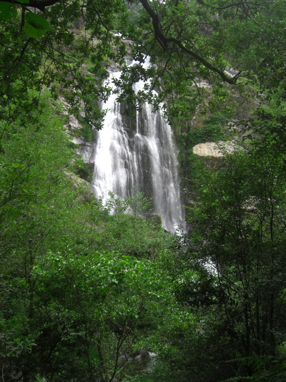 Catarata de la Fervenza del Belelle. Neda (A Coruña).